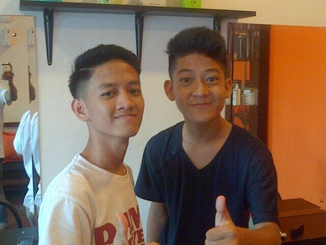 chakra dan ozy